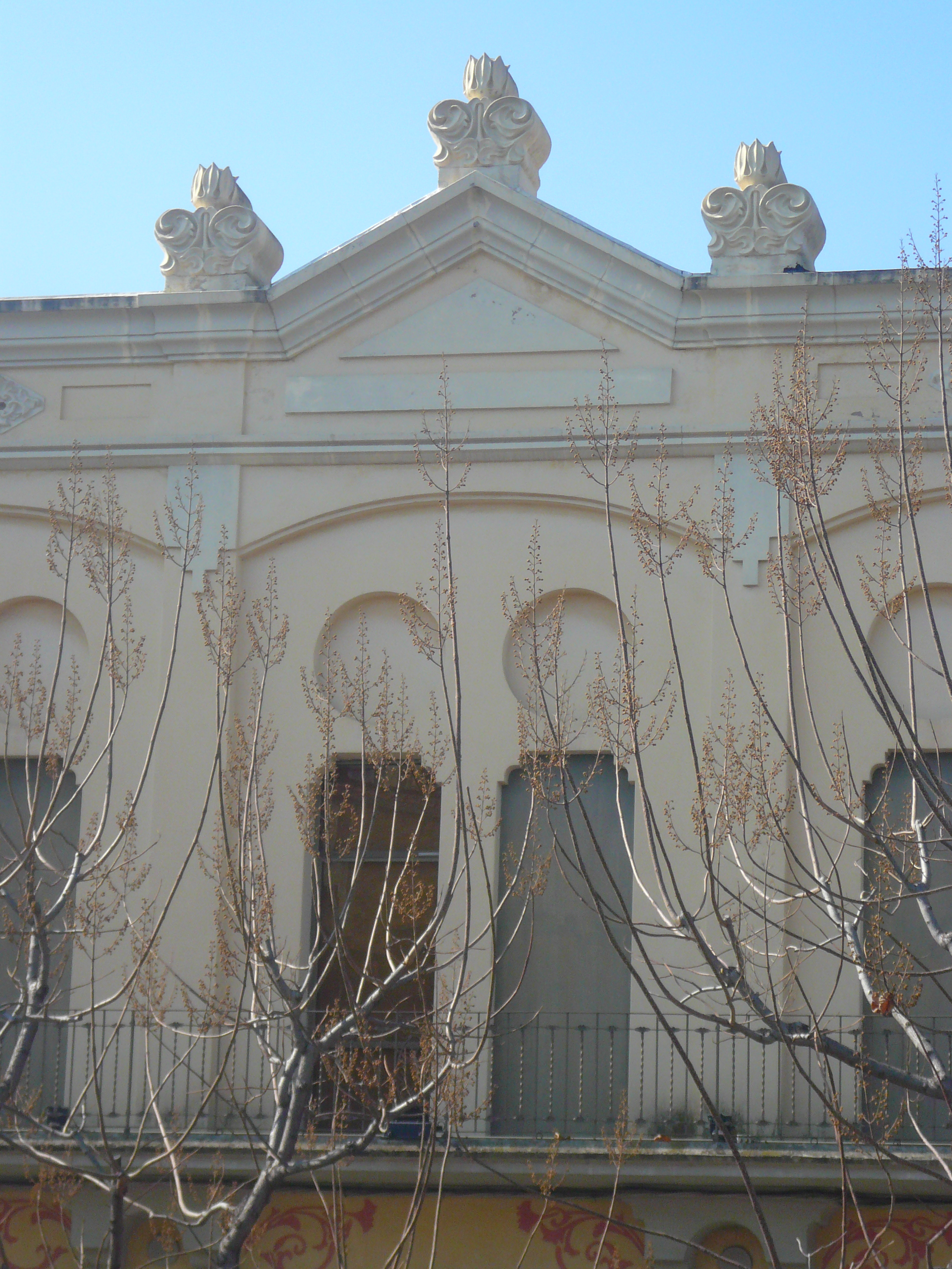 Unió Coral (Sant Feliu de Llobregat) Object location41° 22′ 54.17″ N, 2° 02′ 50.77″ E